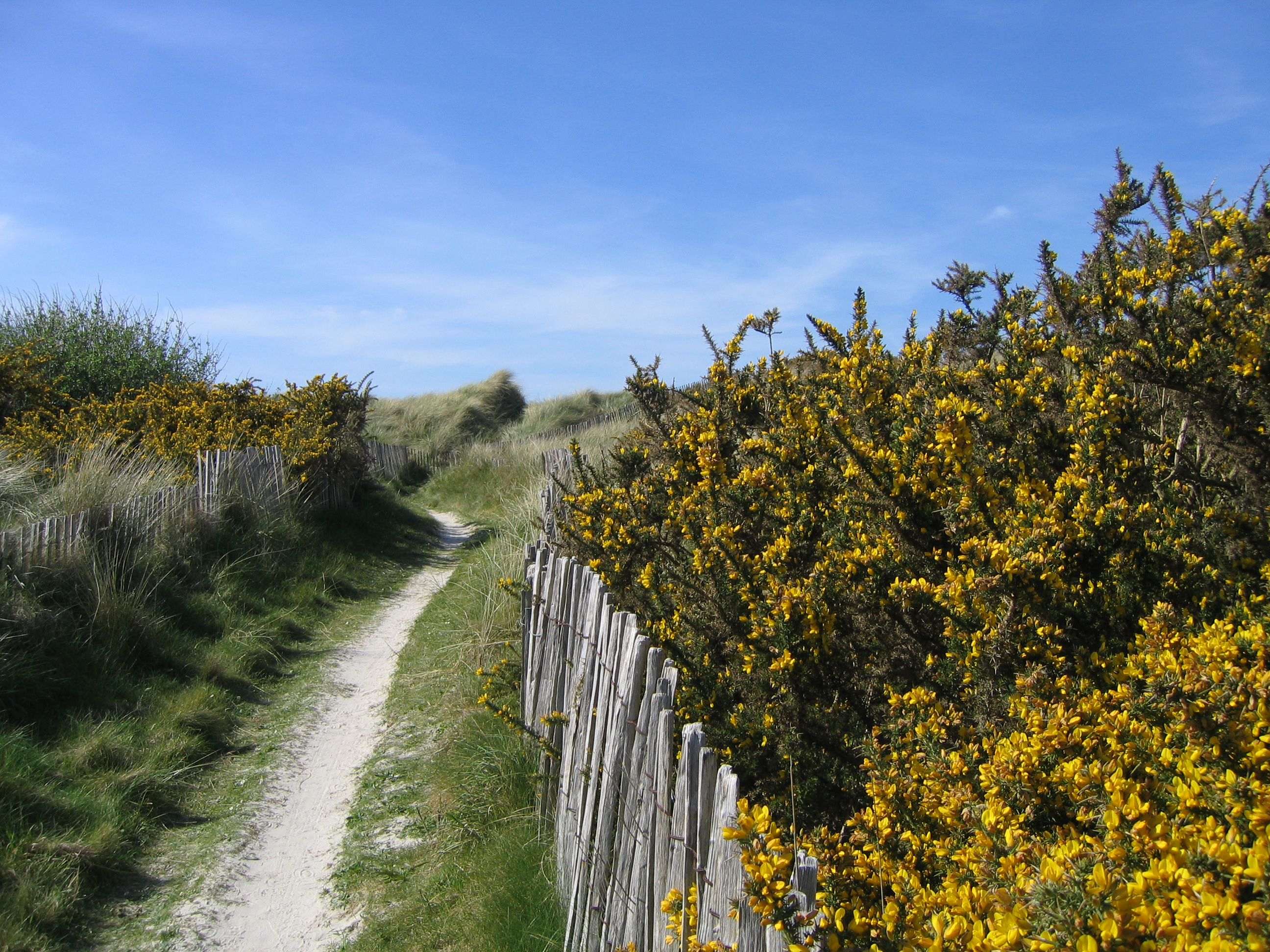 Sentier traversant la dune de Santec